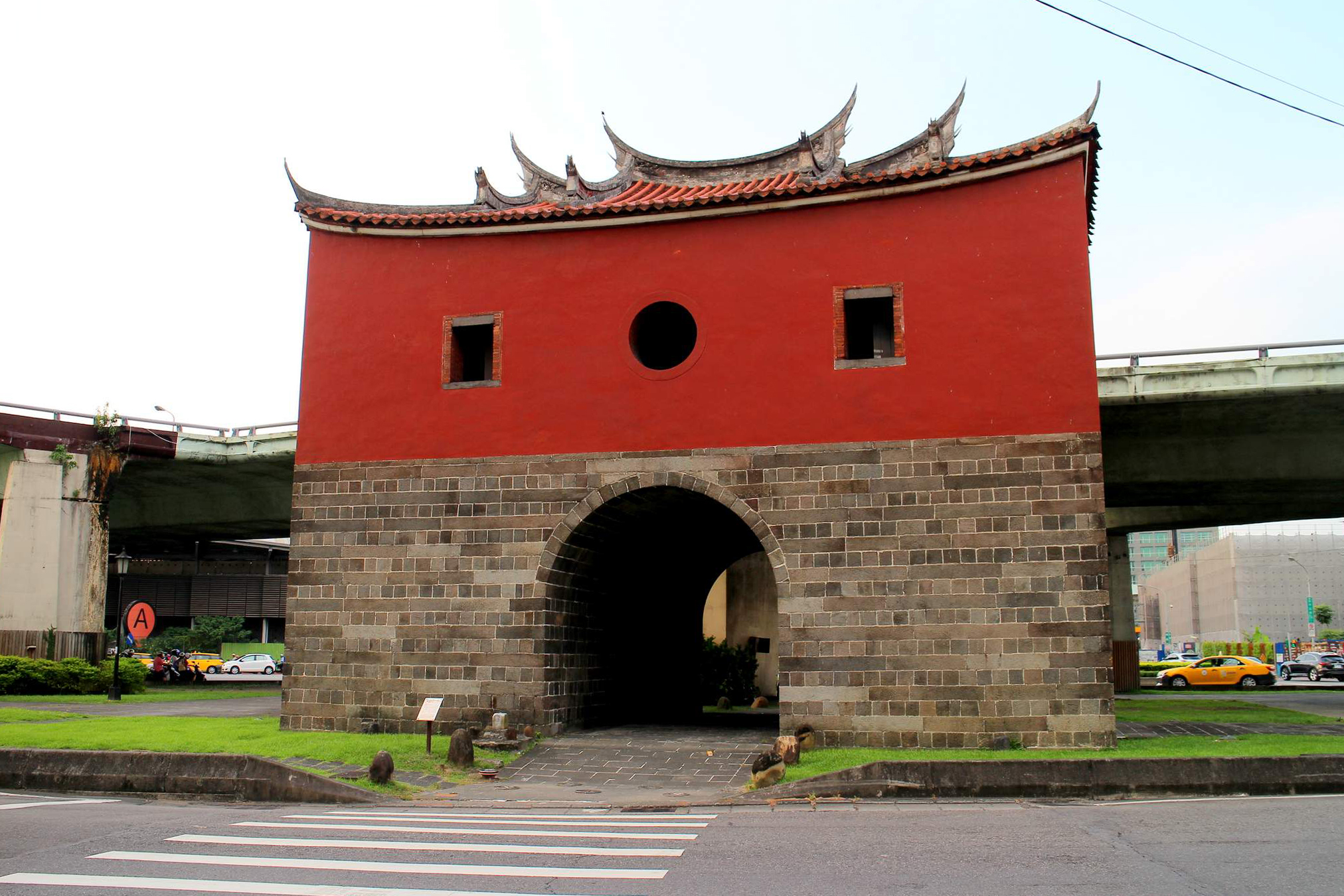 台北古城門